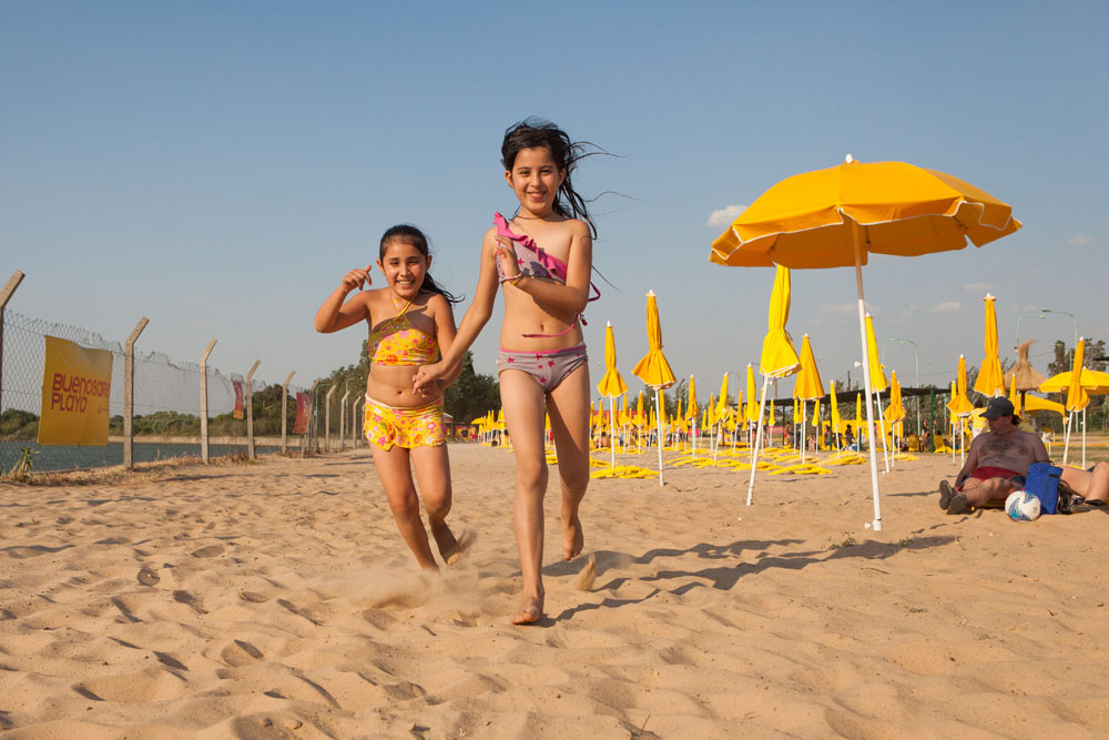 Fotos: Estrella Herrera